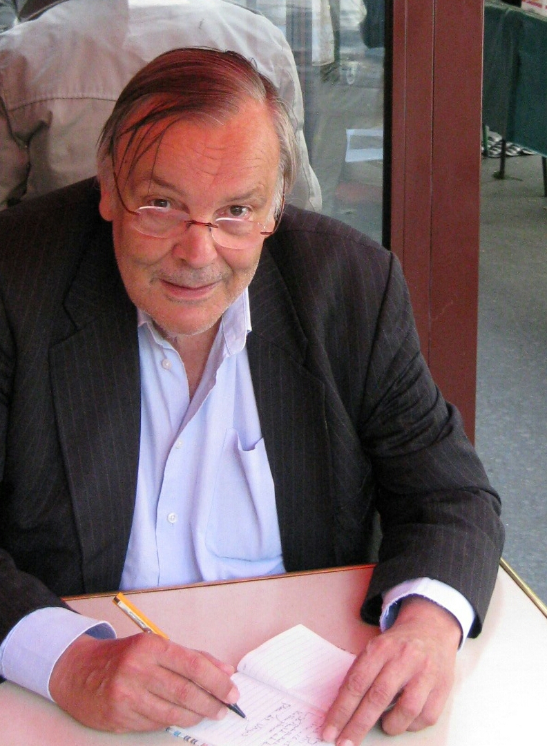 Rik Kuethe